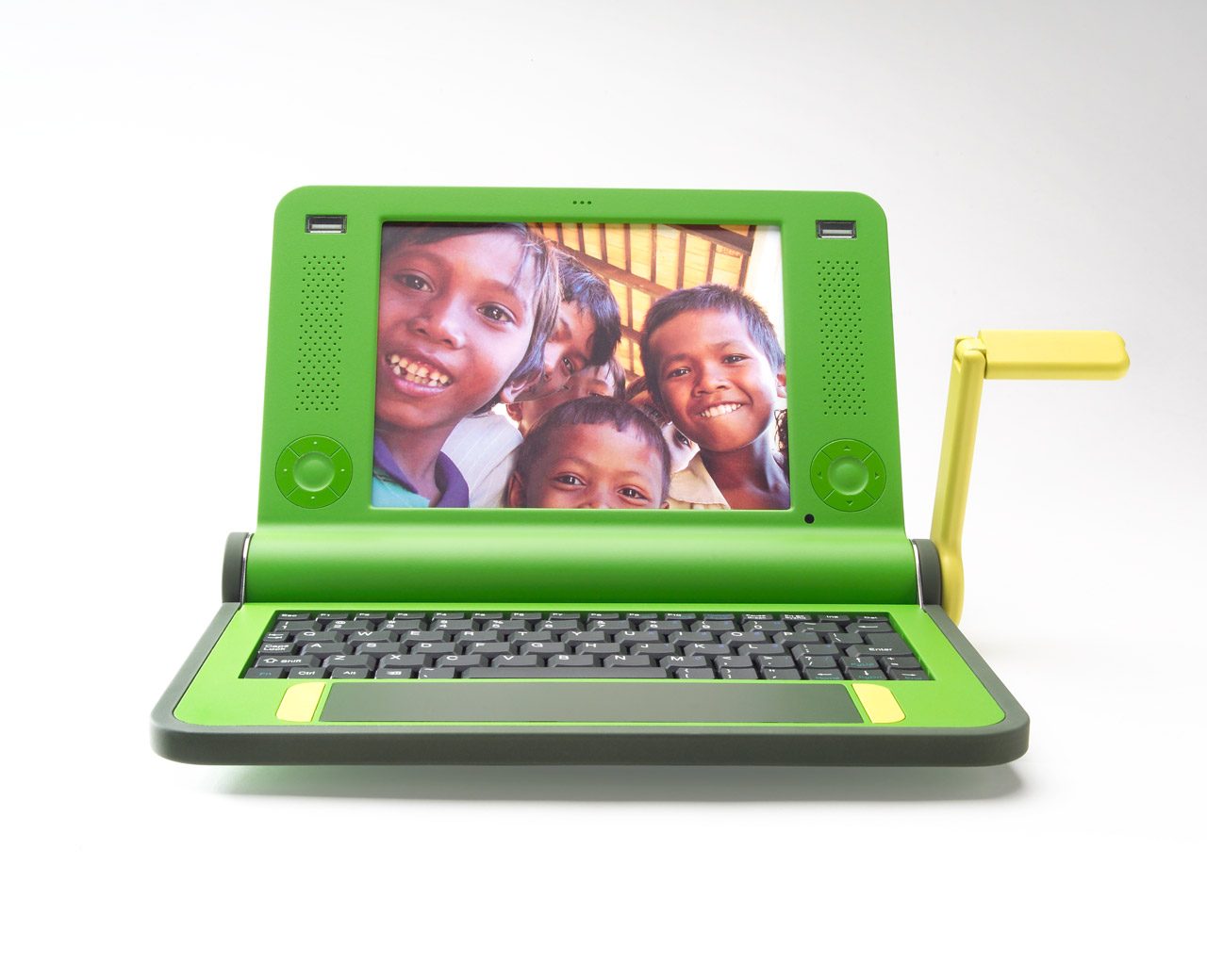 $100 Laptop prototype